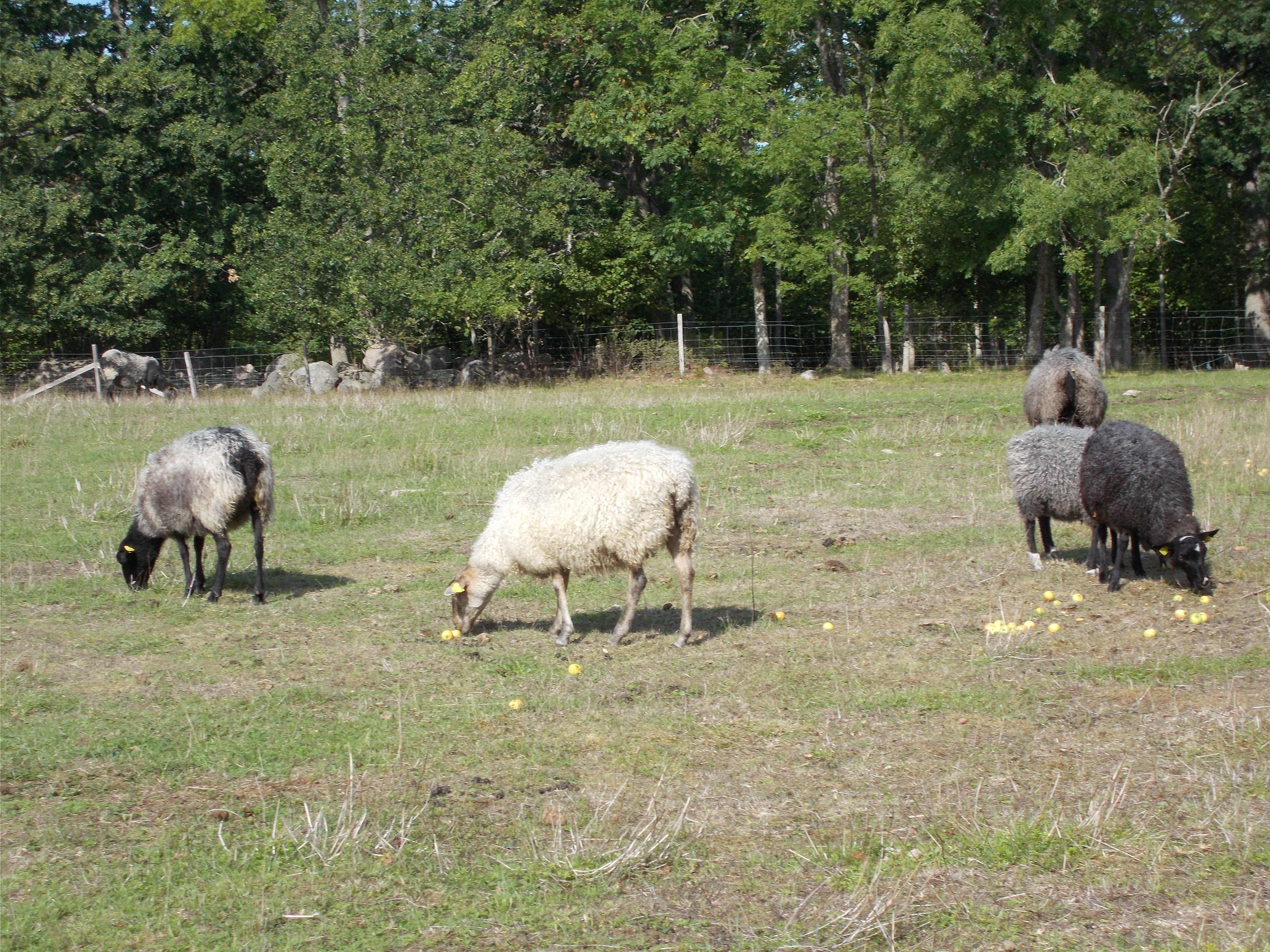 Betande får i Salmbärshagens naturreservat, Gotland.